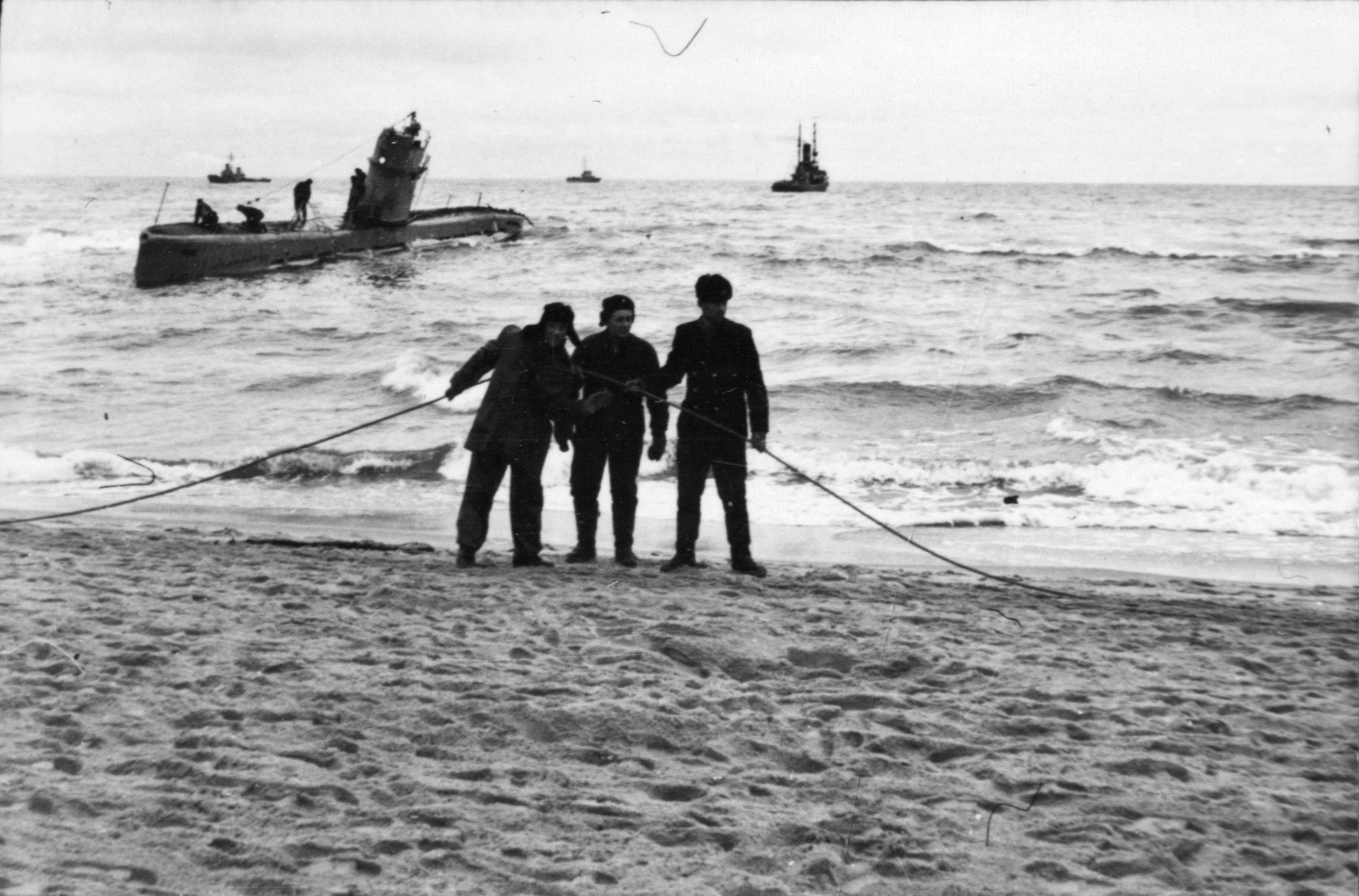 ORP Kaszub M100 w trakcie akcji ściągania z mielizny - Łysica 1957r.